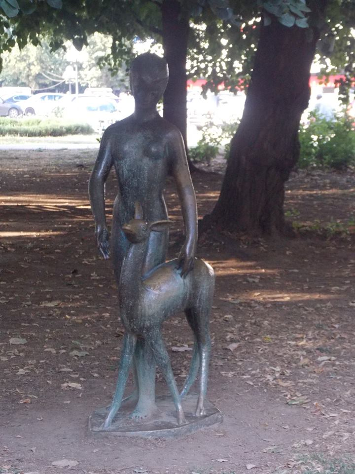 Статуа девојчице са ланетом